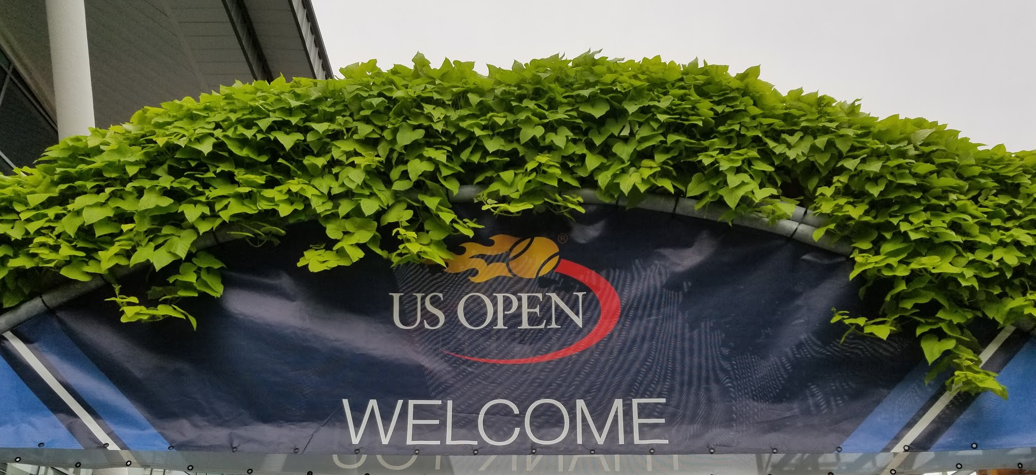 Toldo de bienvenida.